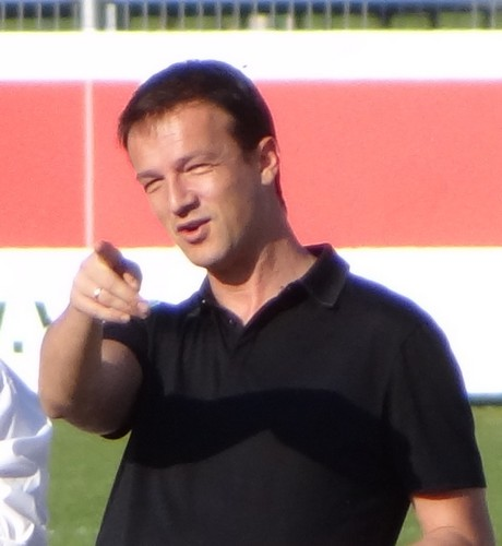 Fredi Bobic beobachtet das Training des VfB Stuttgart. Aufgenommen von